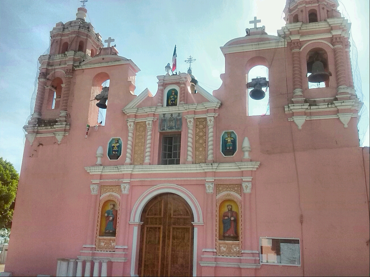 Iglesia de San Baltazar Temaxcalac, Puebla